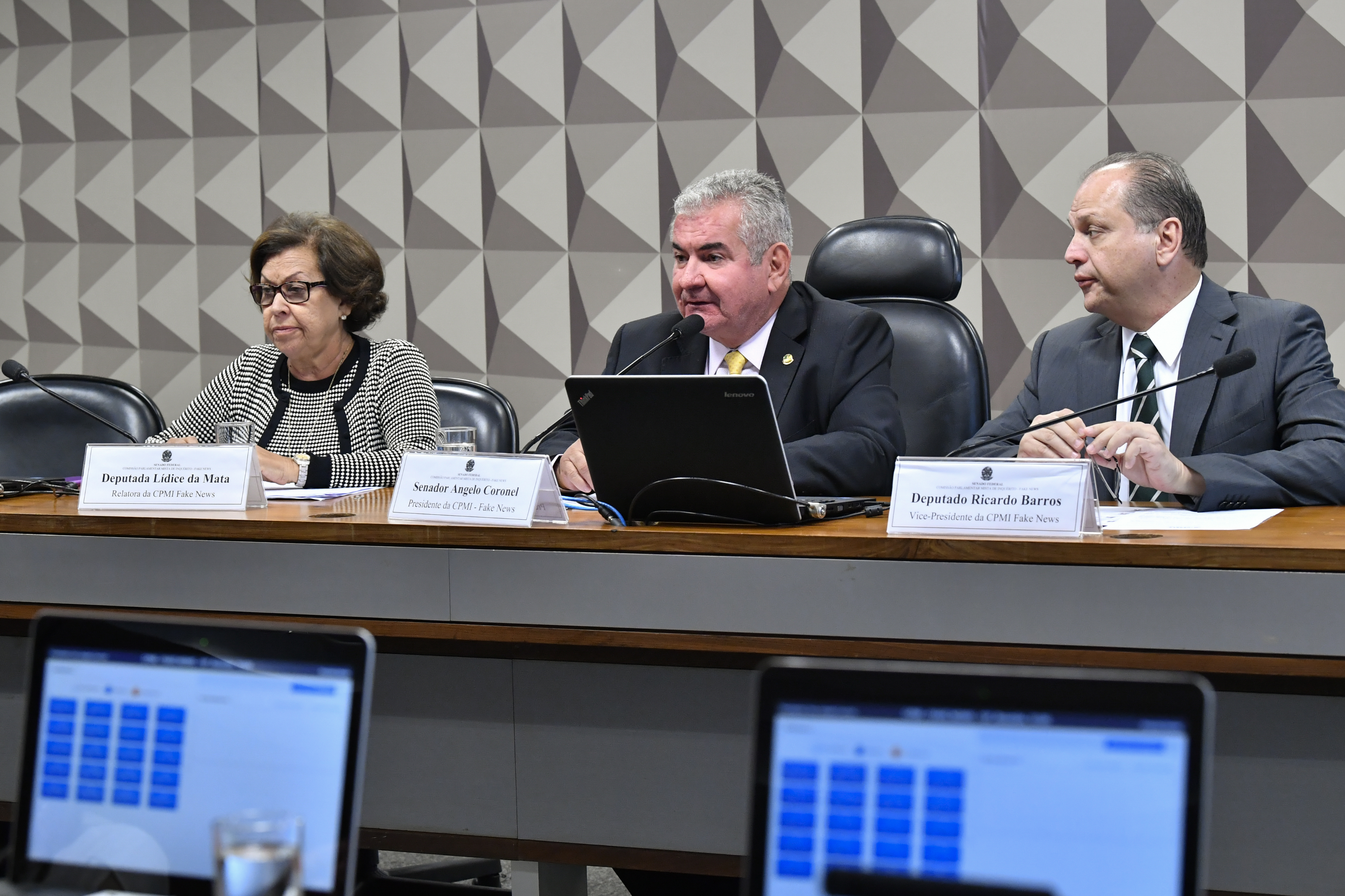 Comissão Parlamentar Mista de Inquérito (CPMI) das Fake News, que investiga a divulgação de notícias falsas nas redes sociais e assédio virtual, realiza reunião de liberativa para apreciação de requerimentos. Mesa: relatora da CPMI das Fake News, deputada Lídice da Mata (PSB-BA); presidente da CPMI das Fake News, senador Angelo Coronel (PSD-BA); vice-presidente da CPMI das Fake News, deputado Ricardo Barros (PP-PR). Foto: Jane de Araújo/Agência Senado